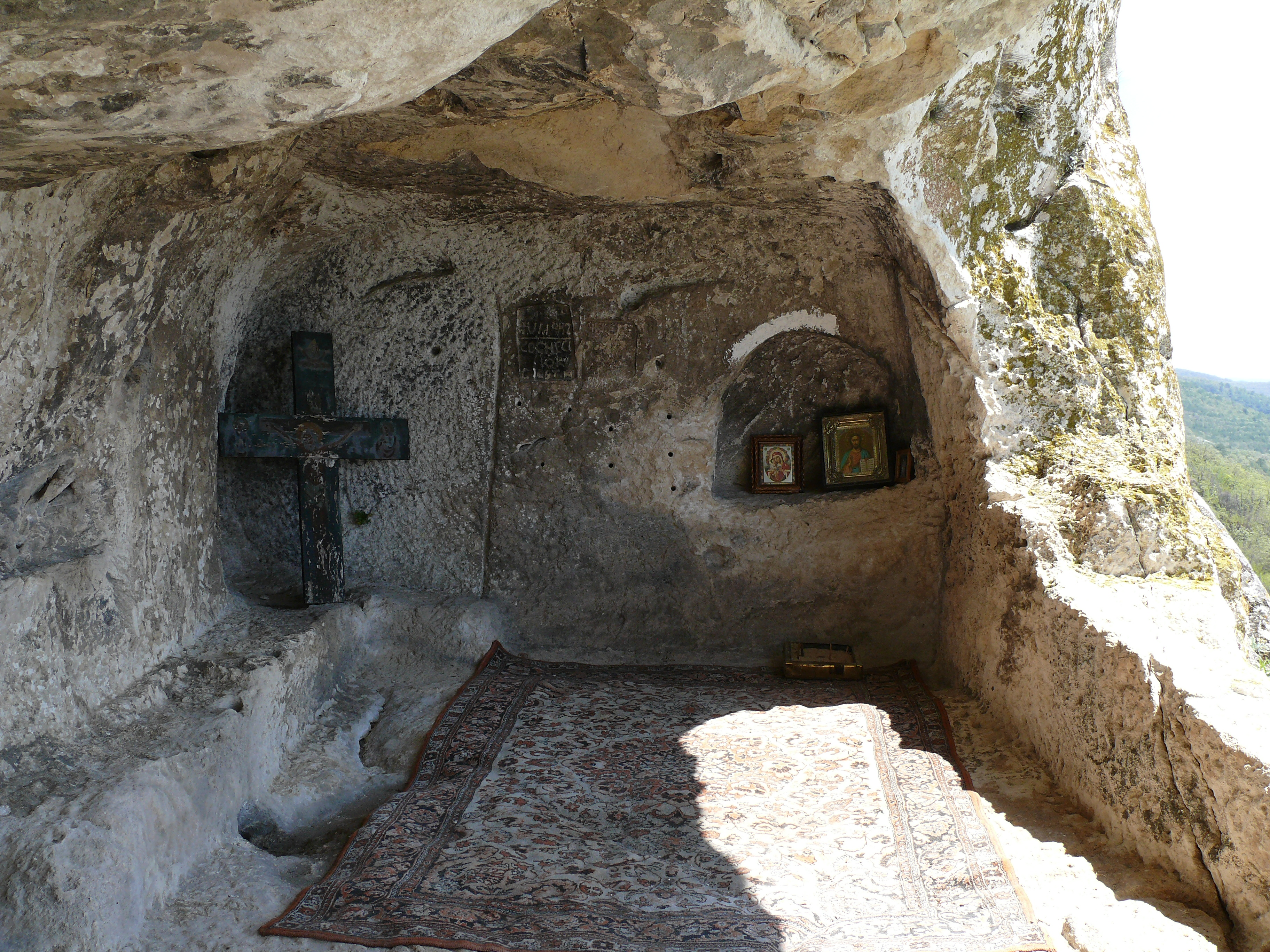 Печерний монастир "Чельтер-Мармара": 1) храм (руїни); 2) спорудження печерні господарські, Севастополь, м. Севастополь, с. Тернівка, 2,0 км на захід і північний захід від села, на північному схилі Кара-Кобинської долини